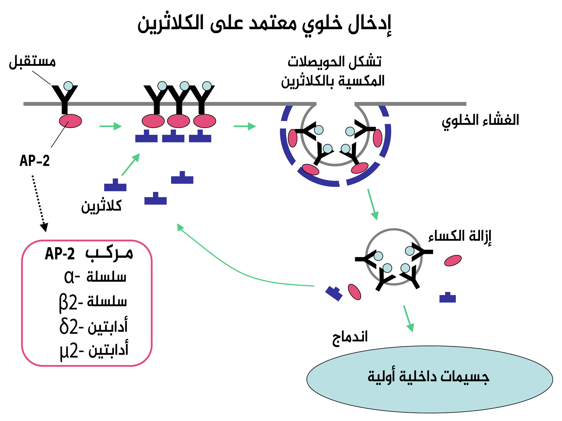 مخطط لآلية الإدخال الخلوي المعتمدة على الكلاثرين.